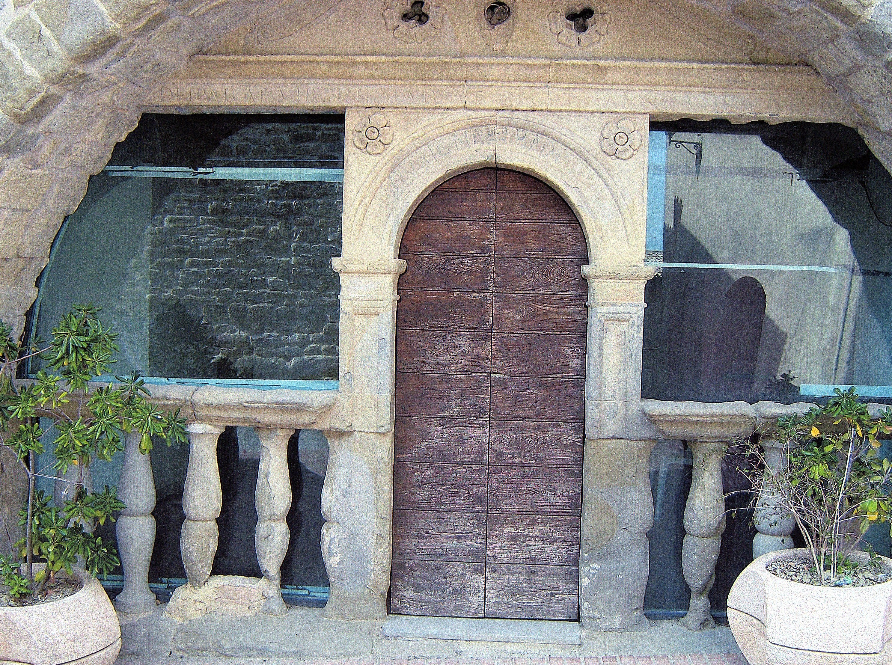 portale del palazzo del Podestà (sec. XIV) a Collemancio (Cannara, Umbria)